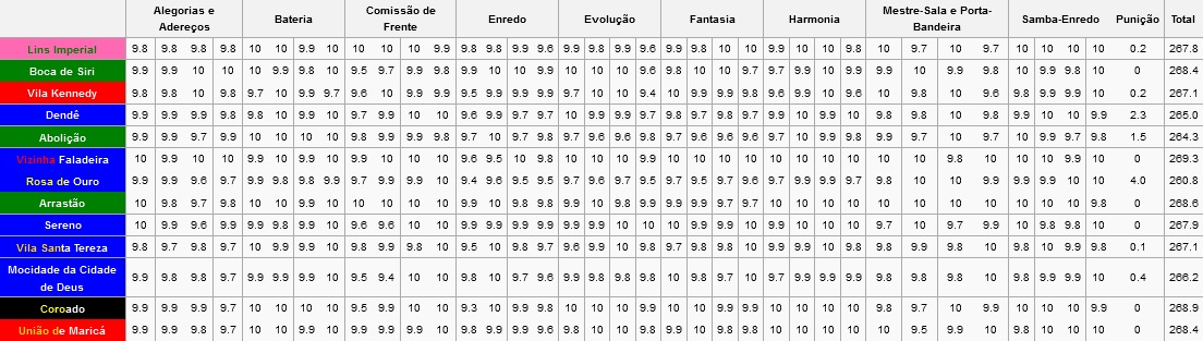 Resultados do Carnaval do Rio - 2016 - Grupo C